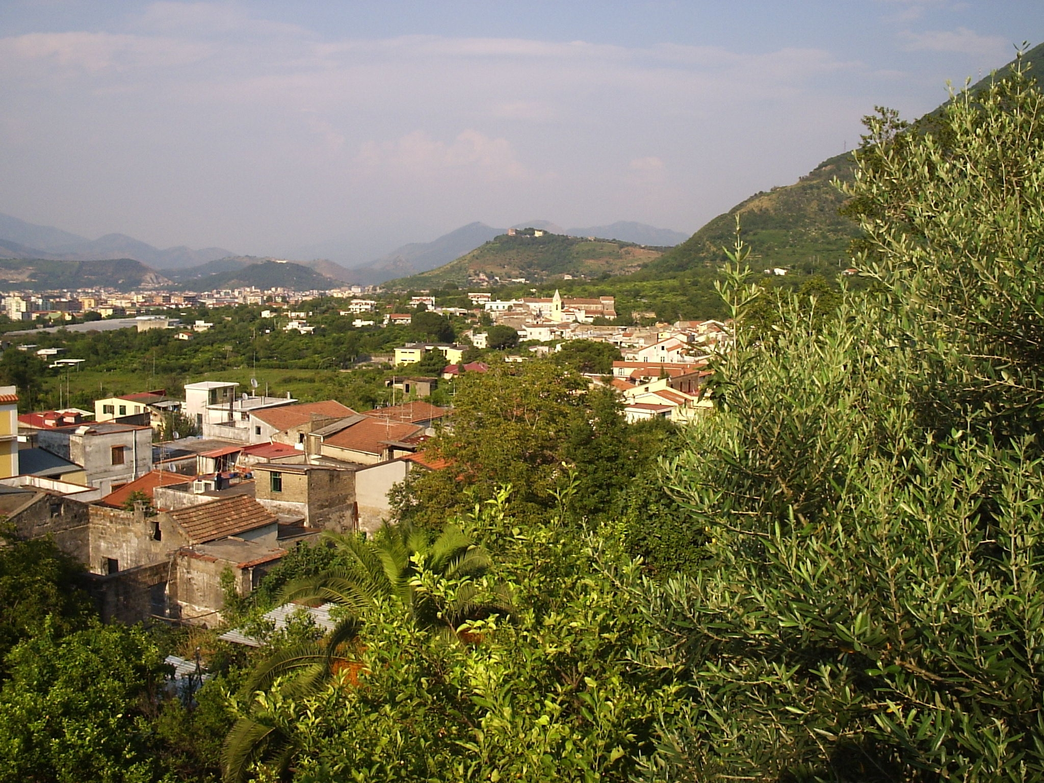 veduta panoramica di Sant'Egidio del Monte Albino (Salerno).